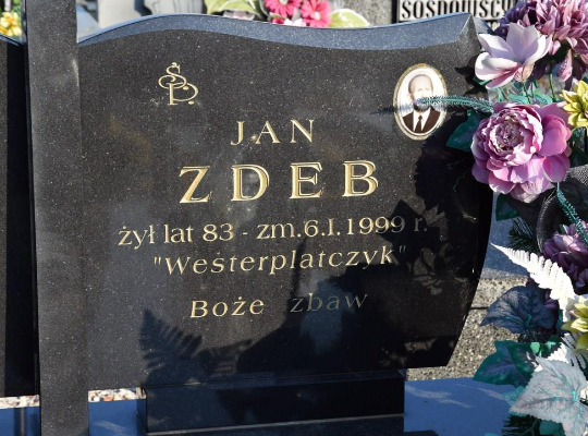 Zdjęcie przedstawia nagrobek Jana Zdeba znajdujący się na cmentarzu parafialnym w Kozłowie.